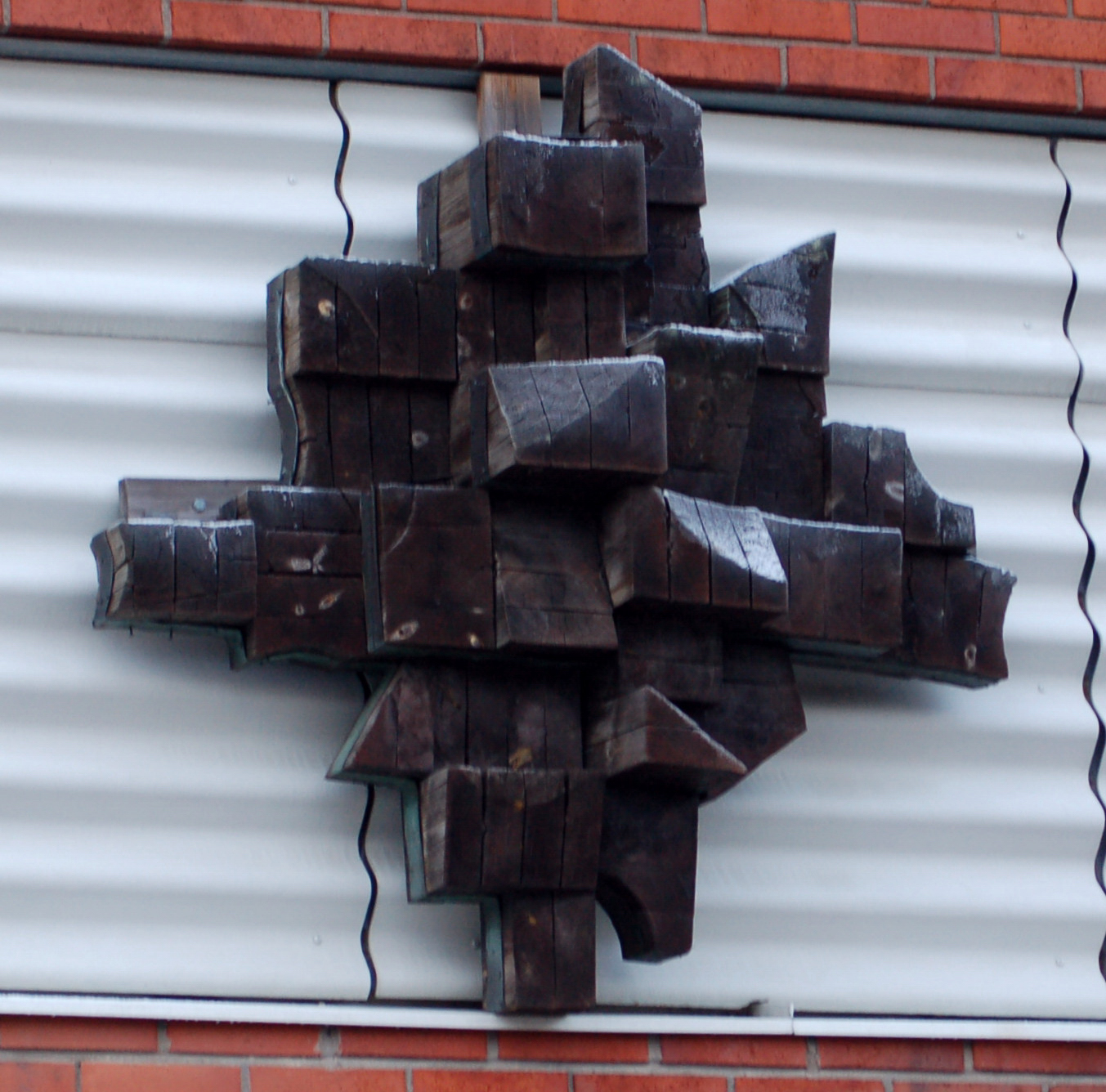 Träkubb på vägg av Gertrud Lööf, fasadutsmyckning på Hemvägen 15 i Våxnäs, Karlstad.